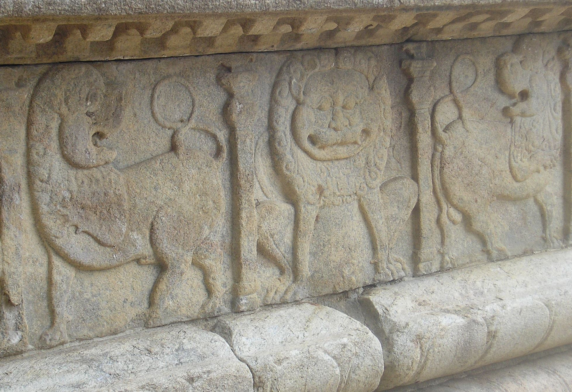 සිංහල: රජරට නිල්ලග්ගම බෝධිගරයේ කැටයම්